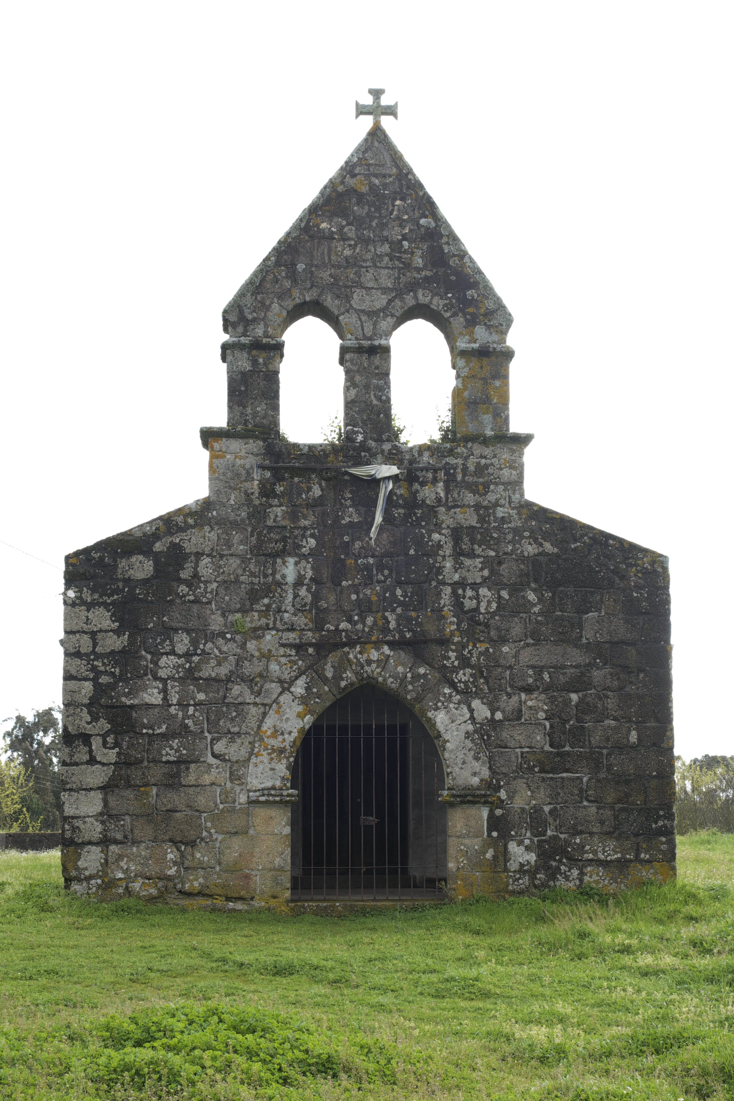 Kirche Santa Maria (Igreja Velha) in Canas de Santa Maria im Kreis Tondela im Distrikt Viseu (Portugal)